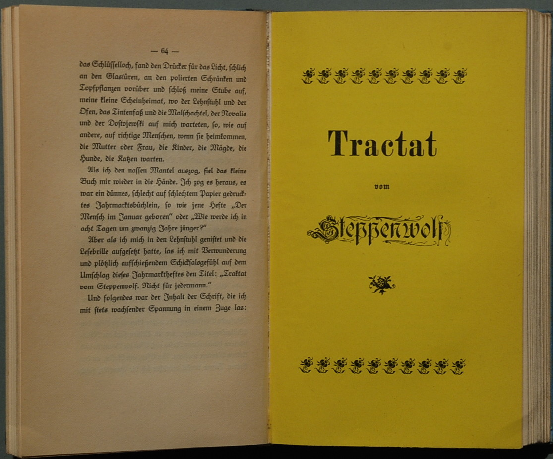 Hesse, Hermann: Tractat vom Steppenwolf. Binnenerzählung in dem Roman «Der Steppenwolf», in der Erstausgabe (nur dort) als gesonderte Broschur eingebunden.